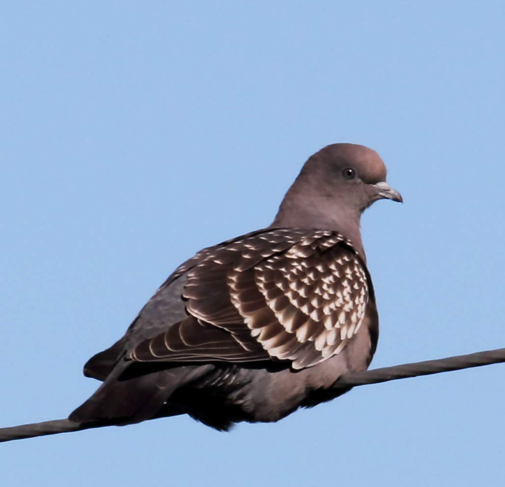 Spot-winged Pigeon (Patagioenas maculosa)